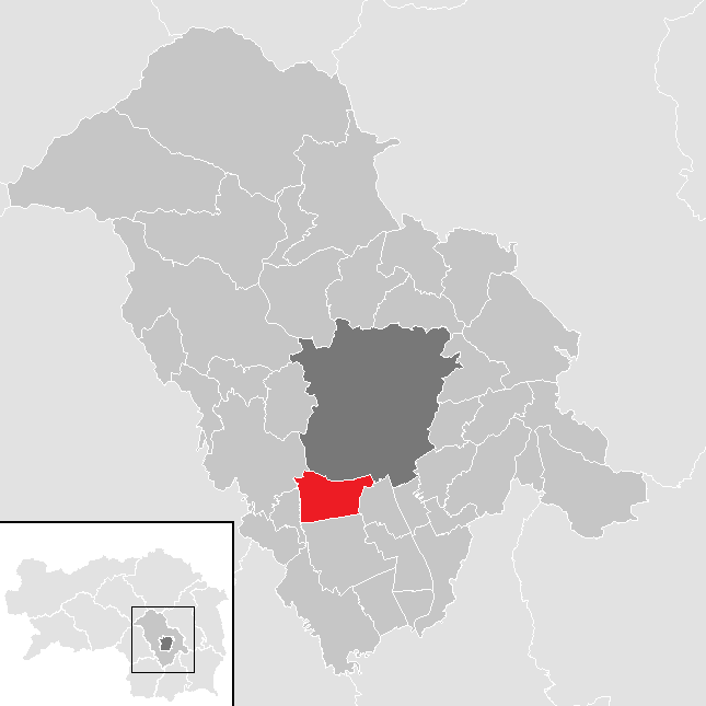 Lage von Seiersberg-Pirka im Bezirk Graz-Umgebung